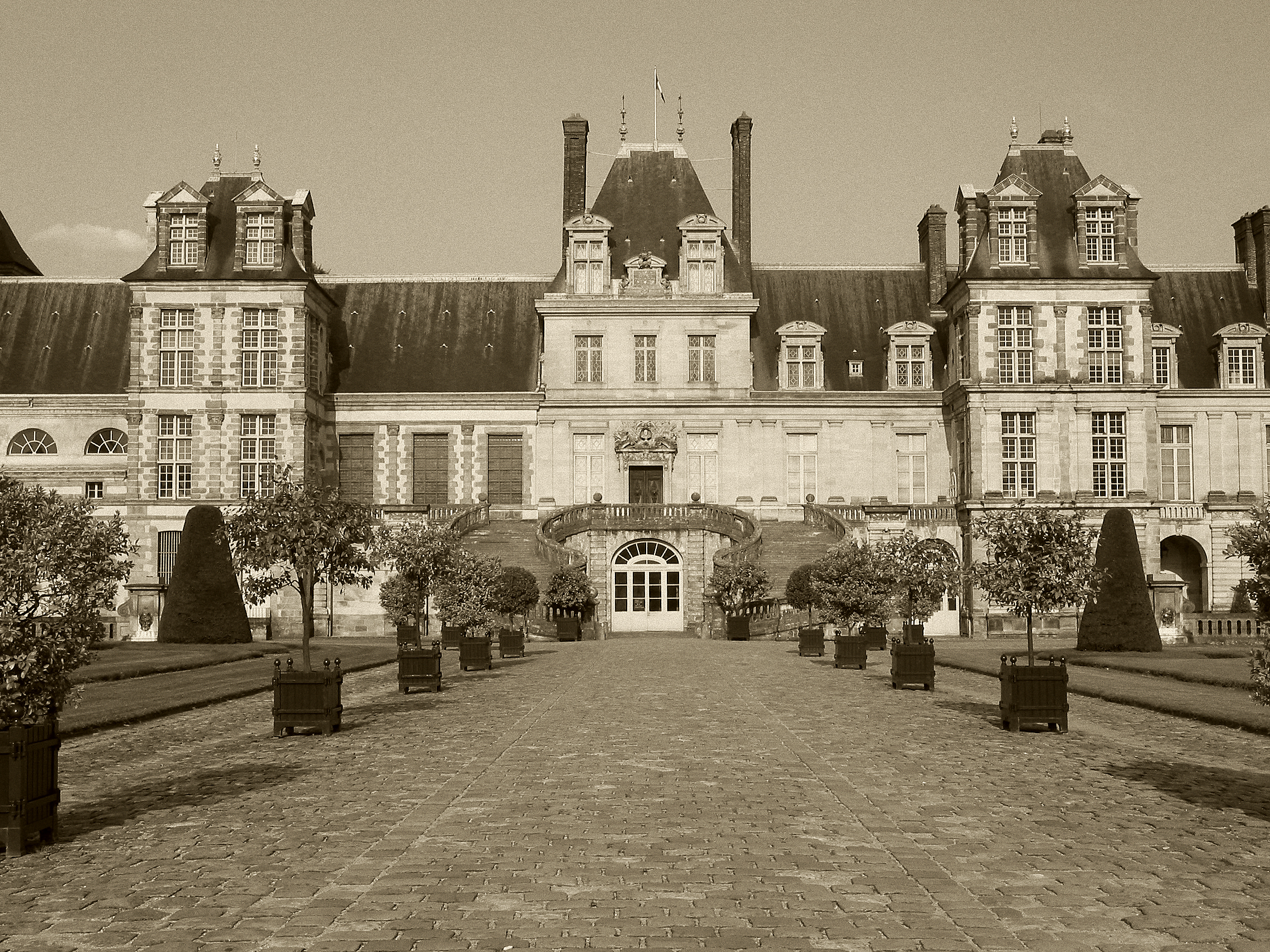 Grand Escalier en fer-à-cheval (en double fer-à-cheval), Cour du cheval blanc, Château de Fontainebleau, France.